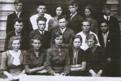 Першы выпуск Талькаўскай школы 10-годкі. 1-ы рад (злева направа): Іда Зубарава, Аня Доўнар, Вольга Матусевіч, Ніна Мамчанкава, Марыя Траццяковіч. 2-гі рад: Прохар Нічыпаравіч Пятруша, Мікалай Дзянісавіч Лабудзёў, Пётр Мікалаевіч Злобіч, Бірыла, Мендэль Ліўшыц. 3-ці рад: Прановіч, Шлёма Шмідт, Ала Мамчанкава, Лейба Розін, Зіна Акуліч, Іван Лысакоўскі.